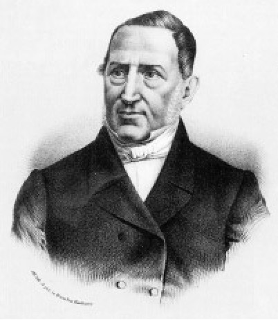 Michael Joseph François Scheidweiler (1799-1861), German botanist and taxonomist